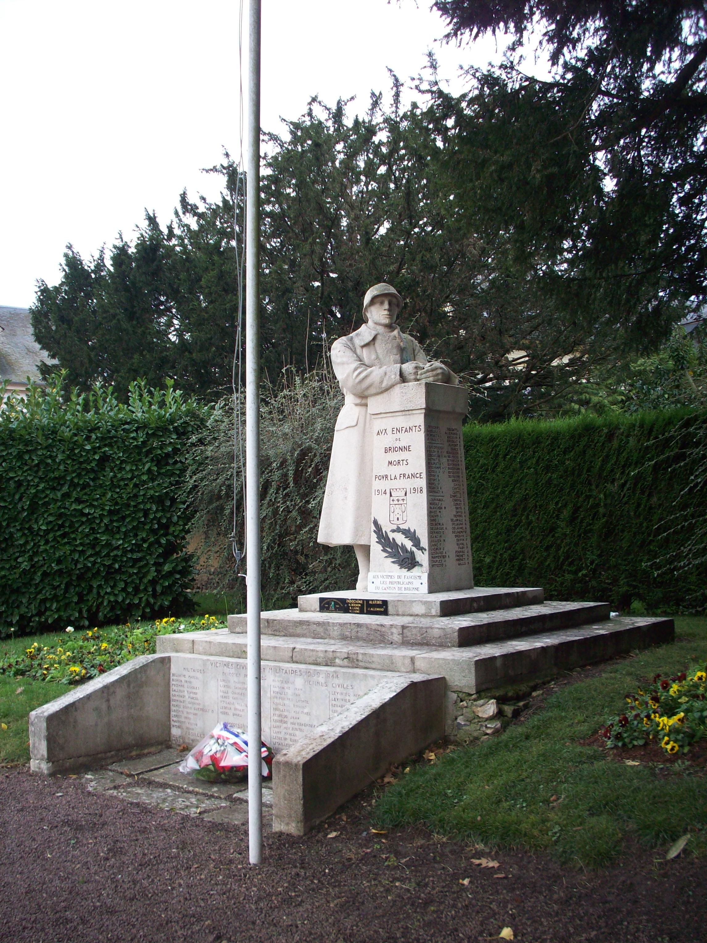 Monument aux morts de Brionne.